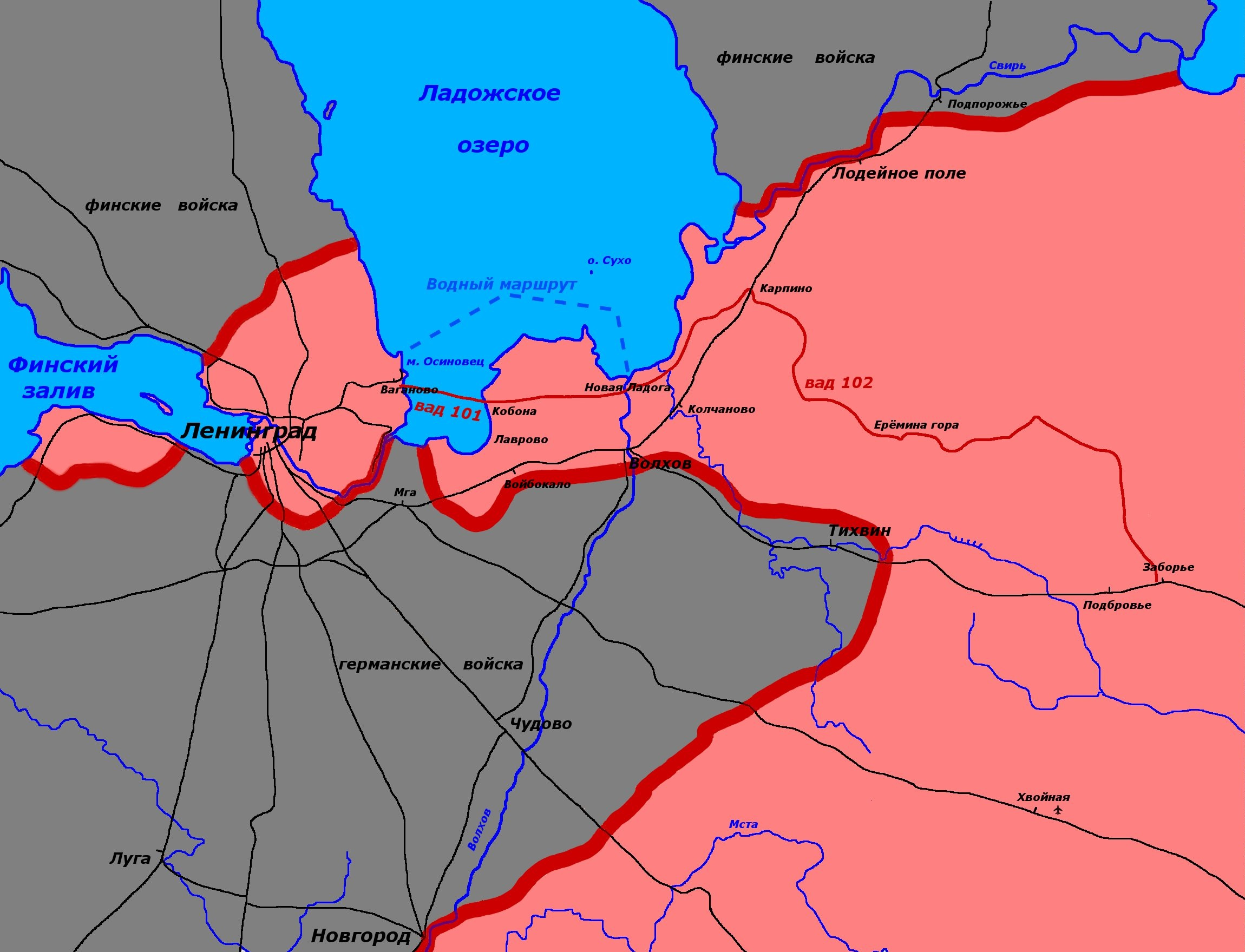 Схема путей доставки грузов в блокированный Ленинград. Сентябрь-декабрь 1941 года для водного маршрута через Ладожское озеро. Конец ноября-декабрь для автотранспорта.